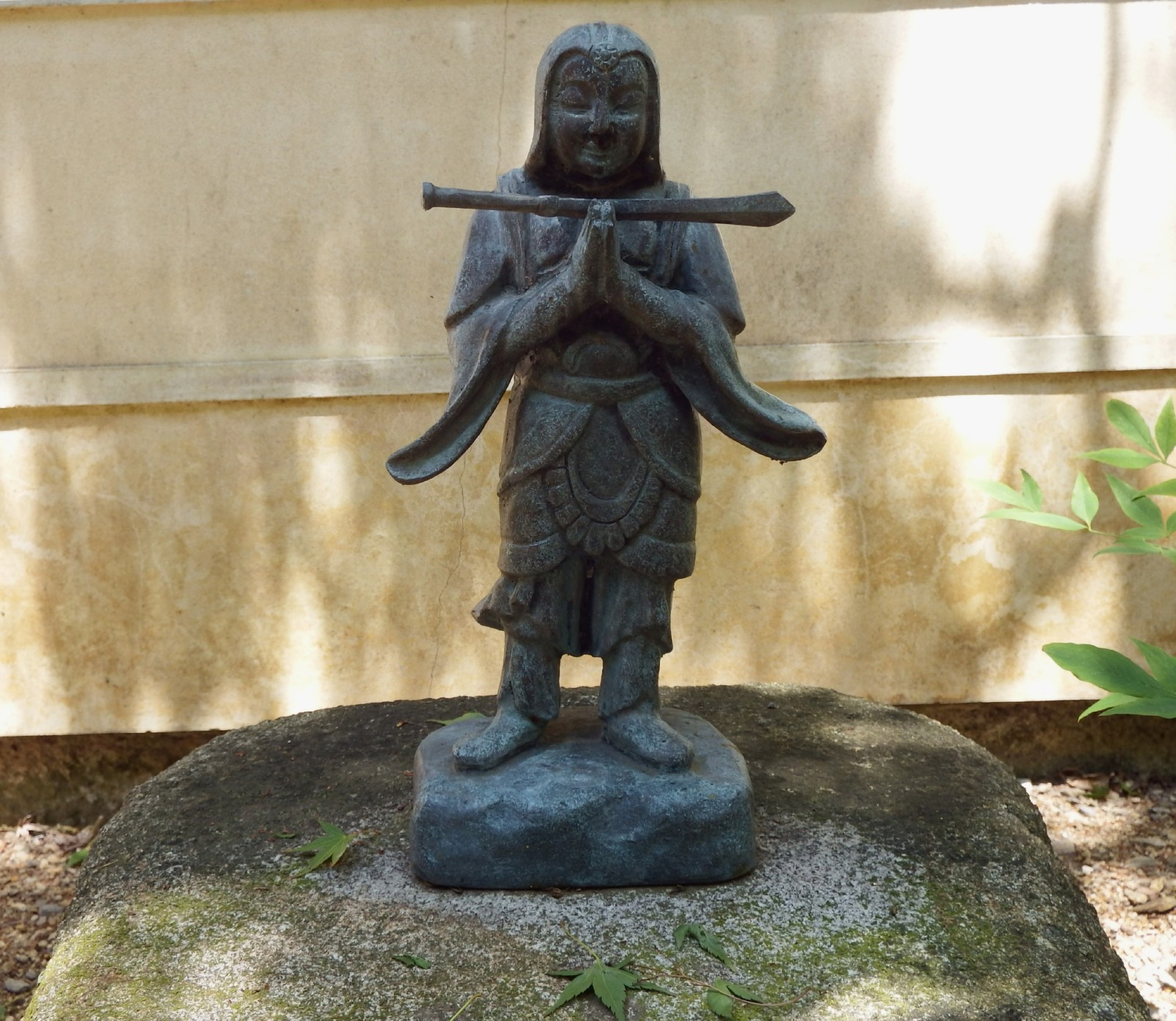 白峯寺の韋駄天像